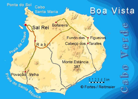 Kartographie: Lucete Fortes / Pitt Reitmaier Design. Pitt Reitmaier Karte vom Urheber hochgeladen